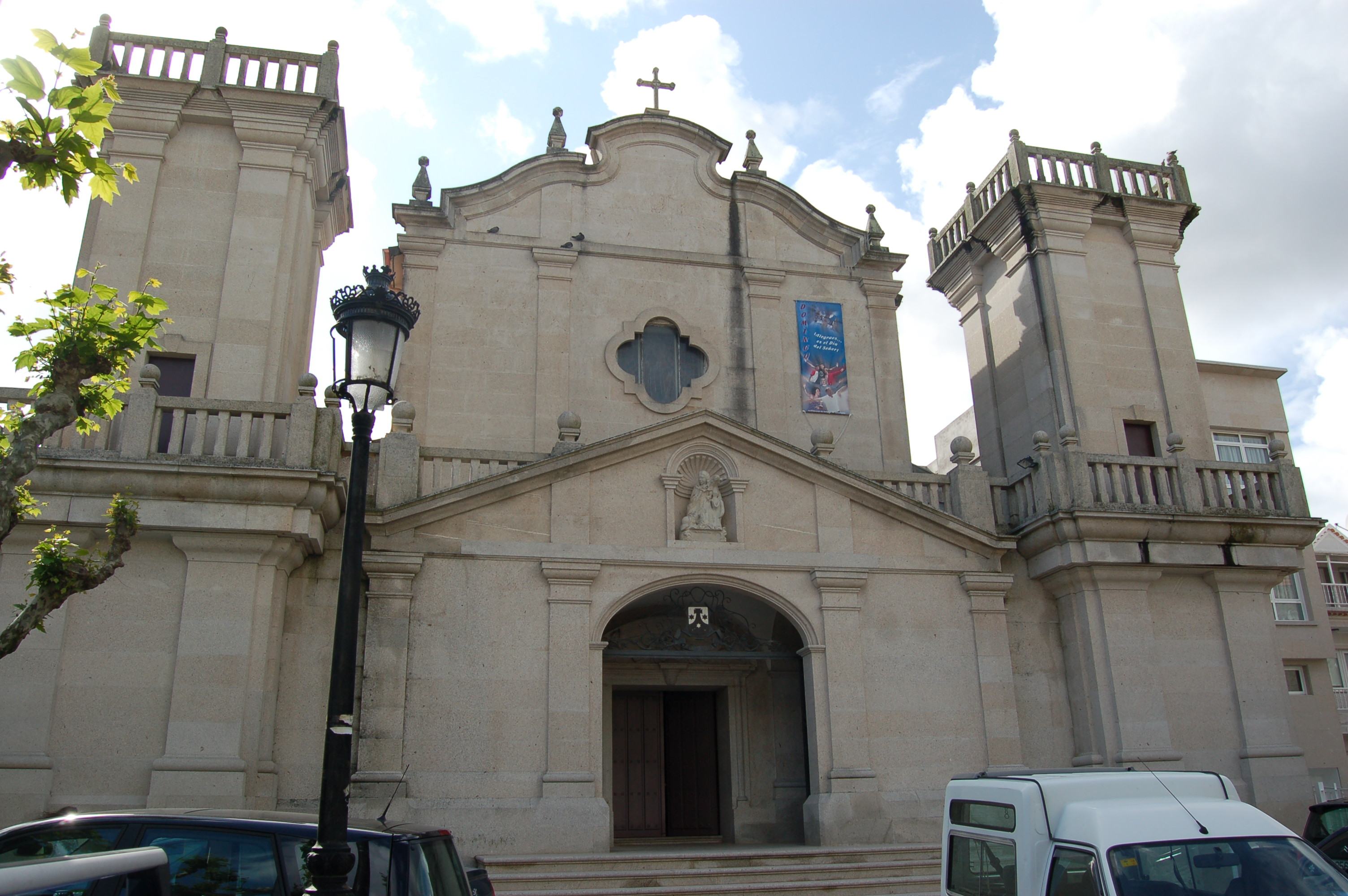 Igrexa parroquial da Virxe do Carme de Moaña